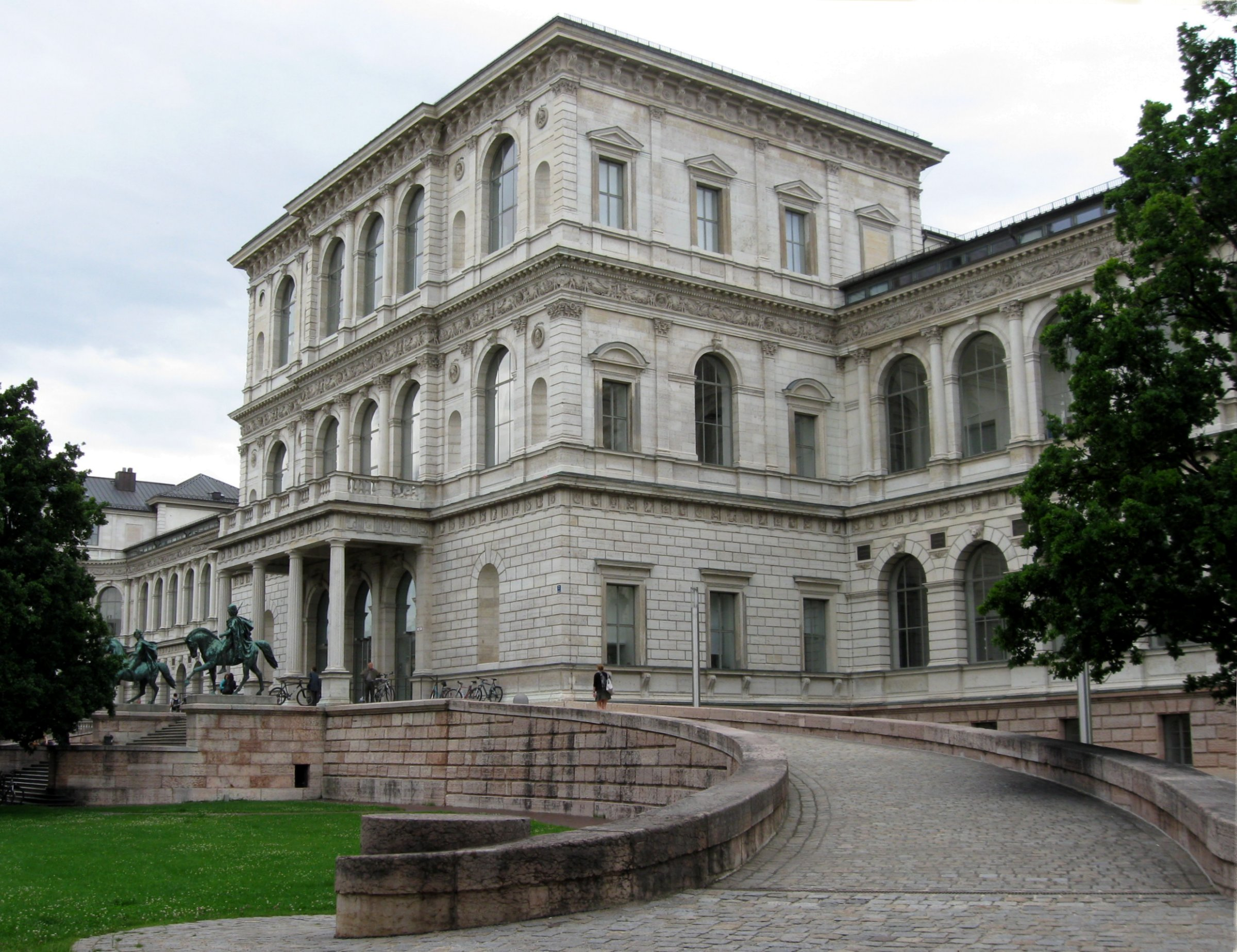 Akademie der Bildenden Künste, München